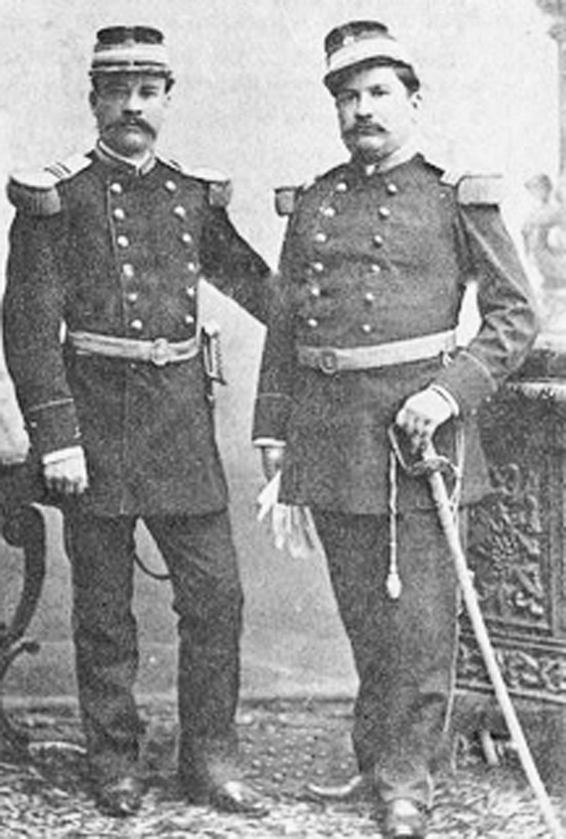 los hermanos de morales bermudez